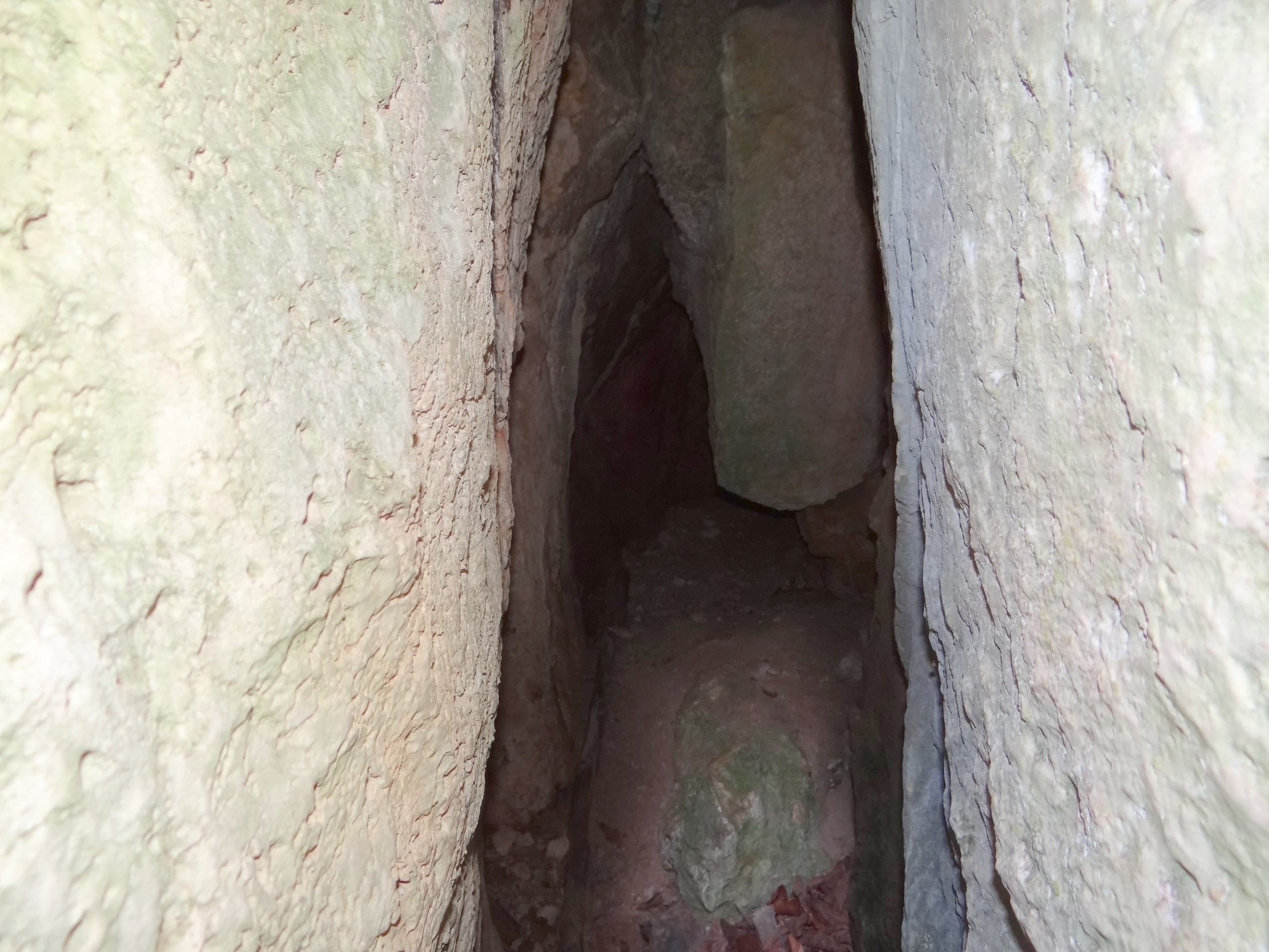 Szczelina w Popielowej Górze